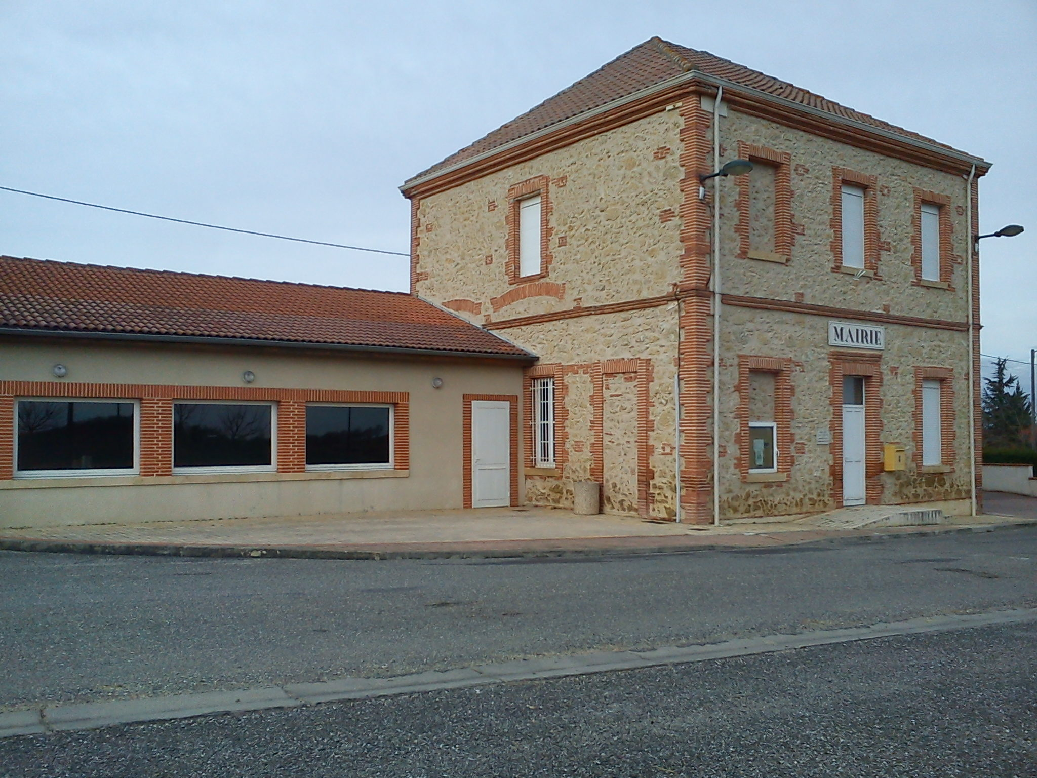 Polastron (Haute-Garonne) mairie